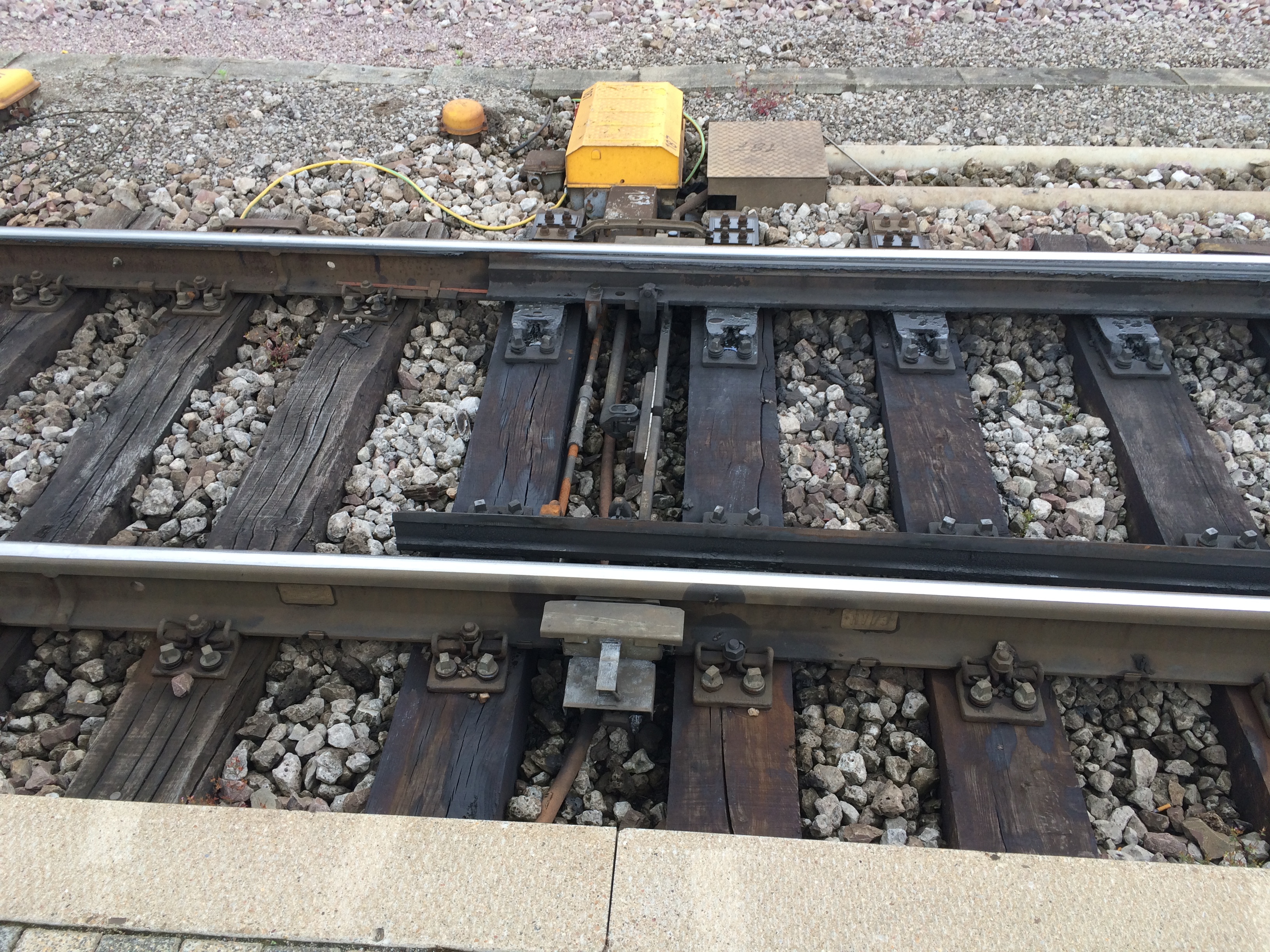 Motorisierte Weiche in Bettemburg (Luxemburg) an Gleis 5.